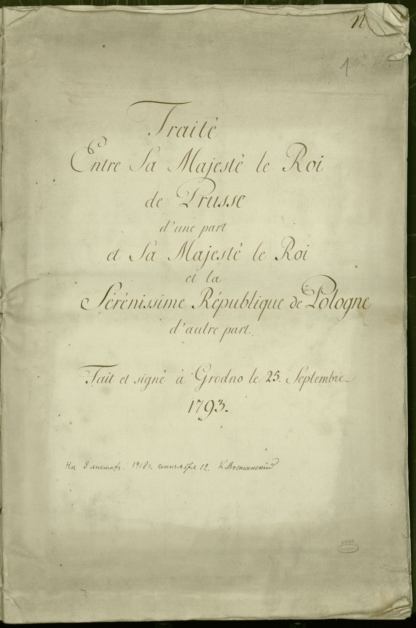 Traktat rozbiorowy